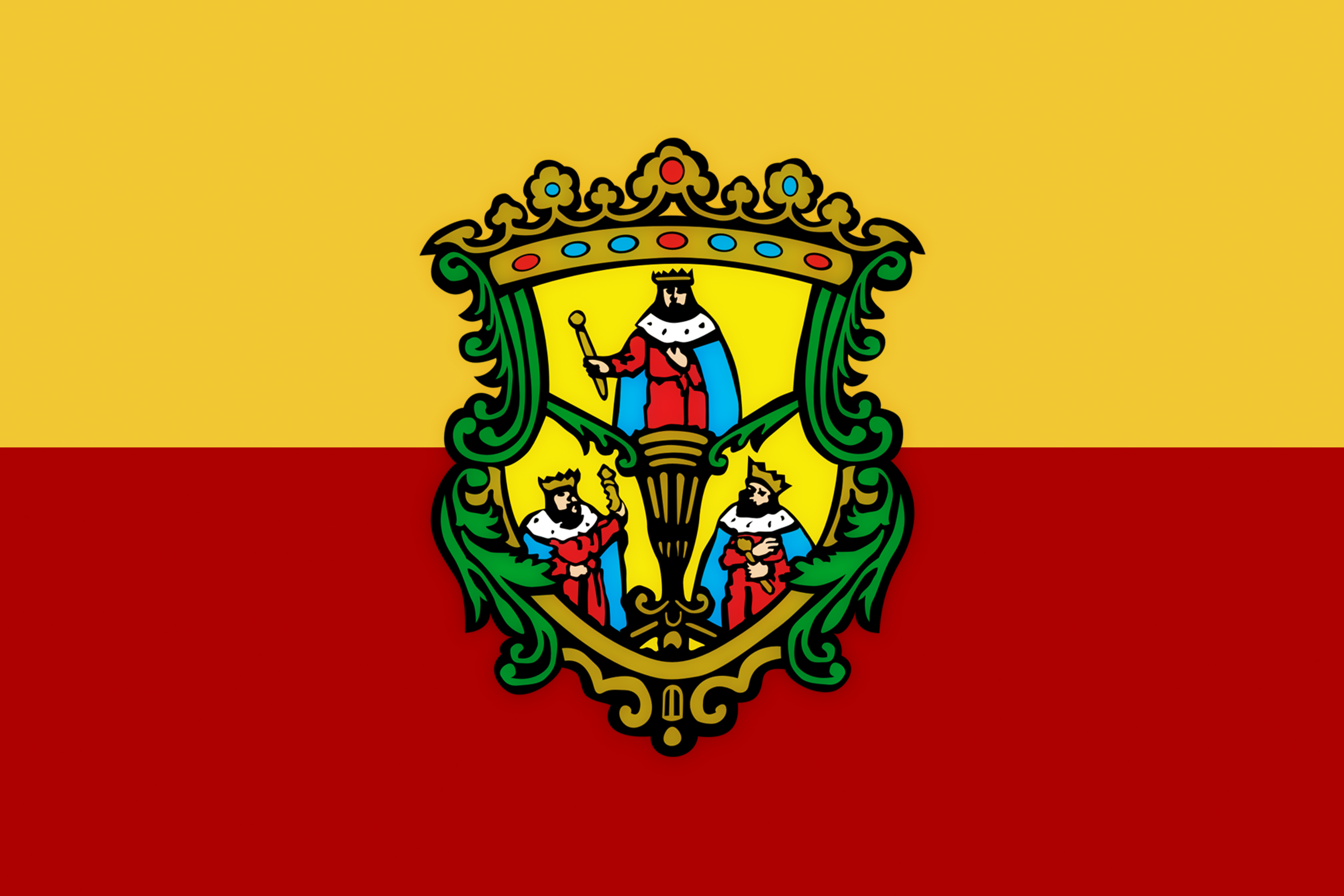 Bandera de Morelia, Michoacan.